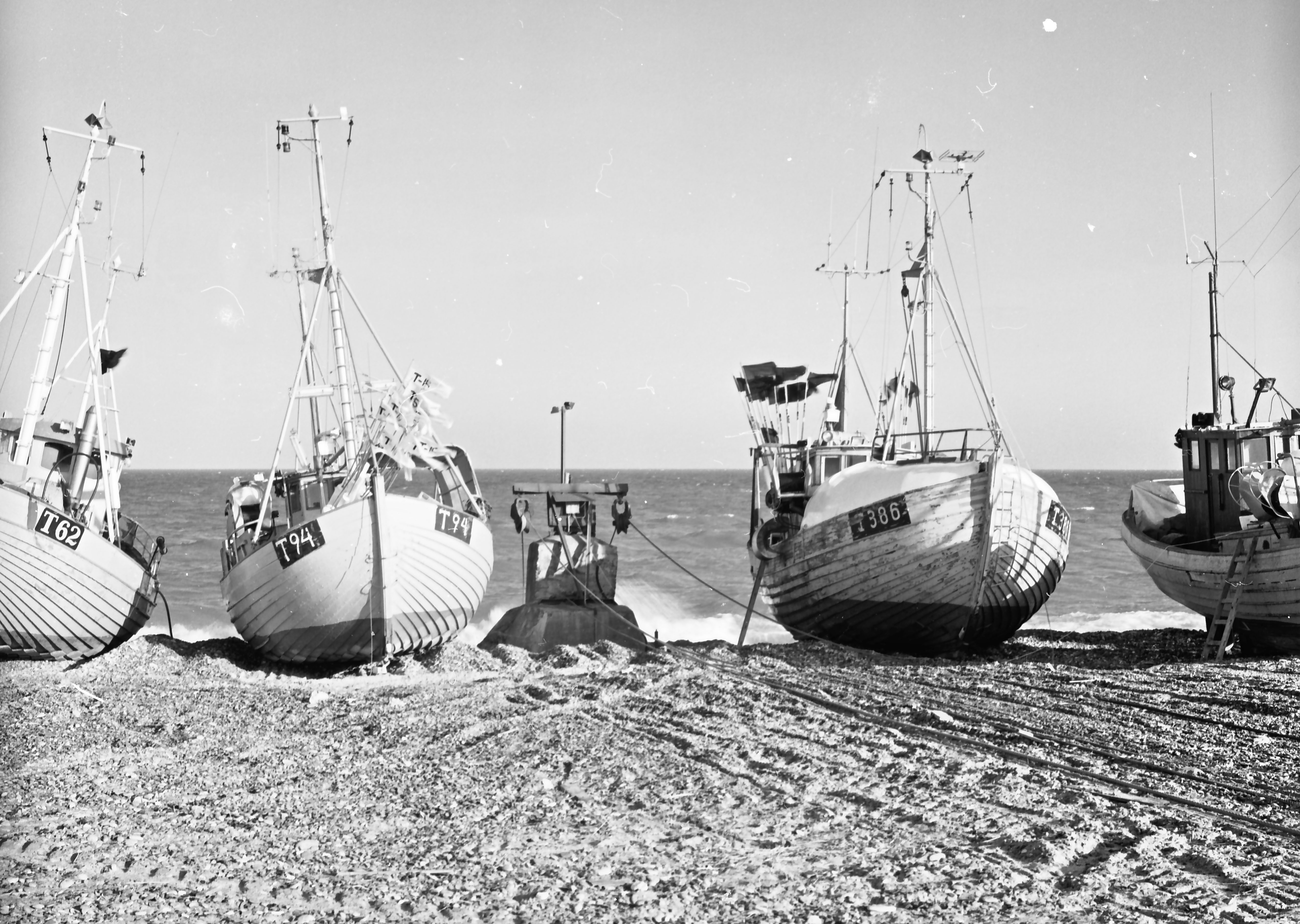 Både trukket op på Lild strand.